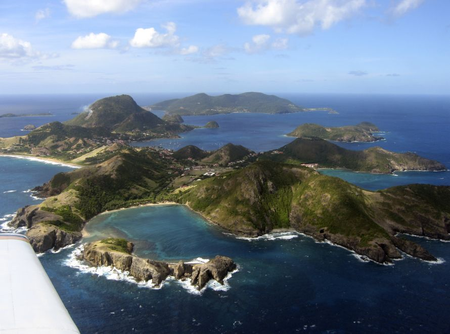 Photo : Nicolas Vilars Les Saintes vues d'avion. Au premier plan, Terre-de-Haut, au deuxième plan, Terre-de-Bas. À droite, au milieu de l'image, l'Ilet Cabris.